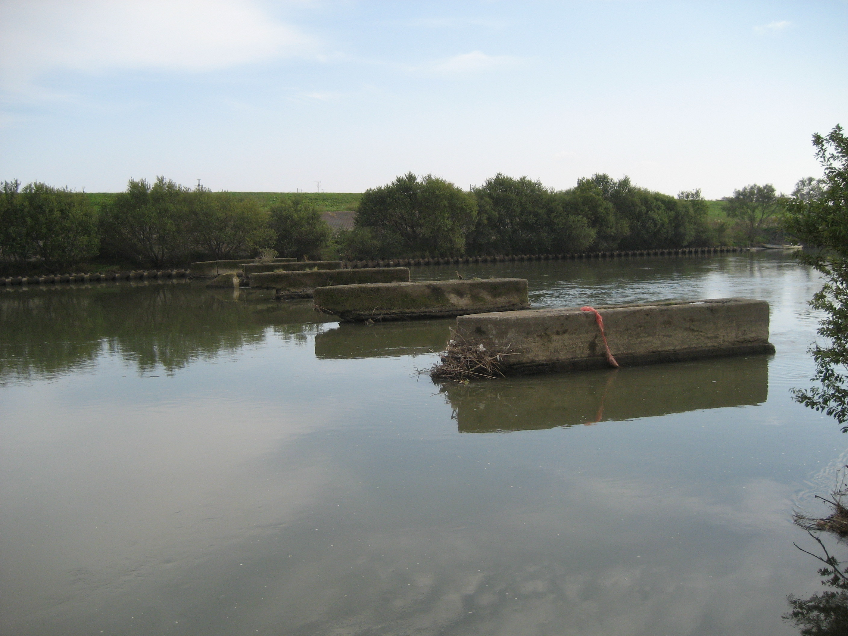 旧流山橋跡（埼玉県三郷市側から撮影）